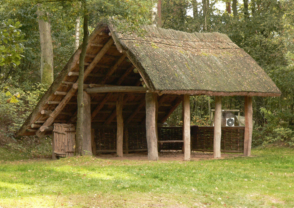 Nachbau sächsisches Nebengebäude bei Liebenau